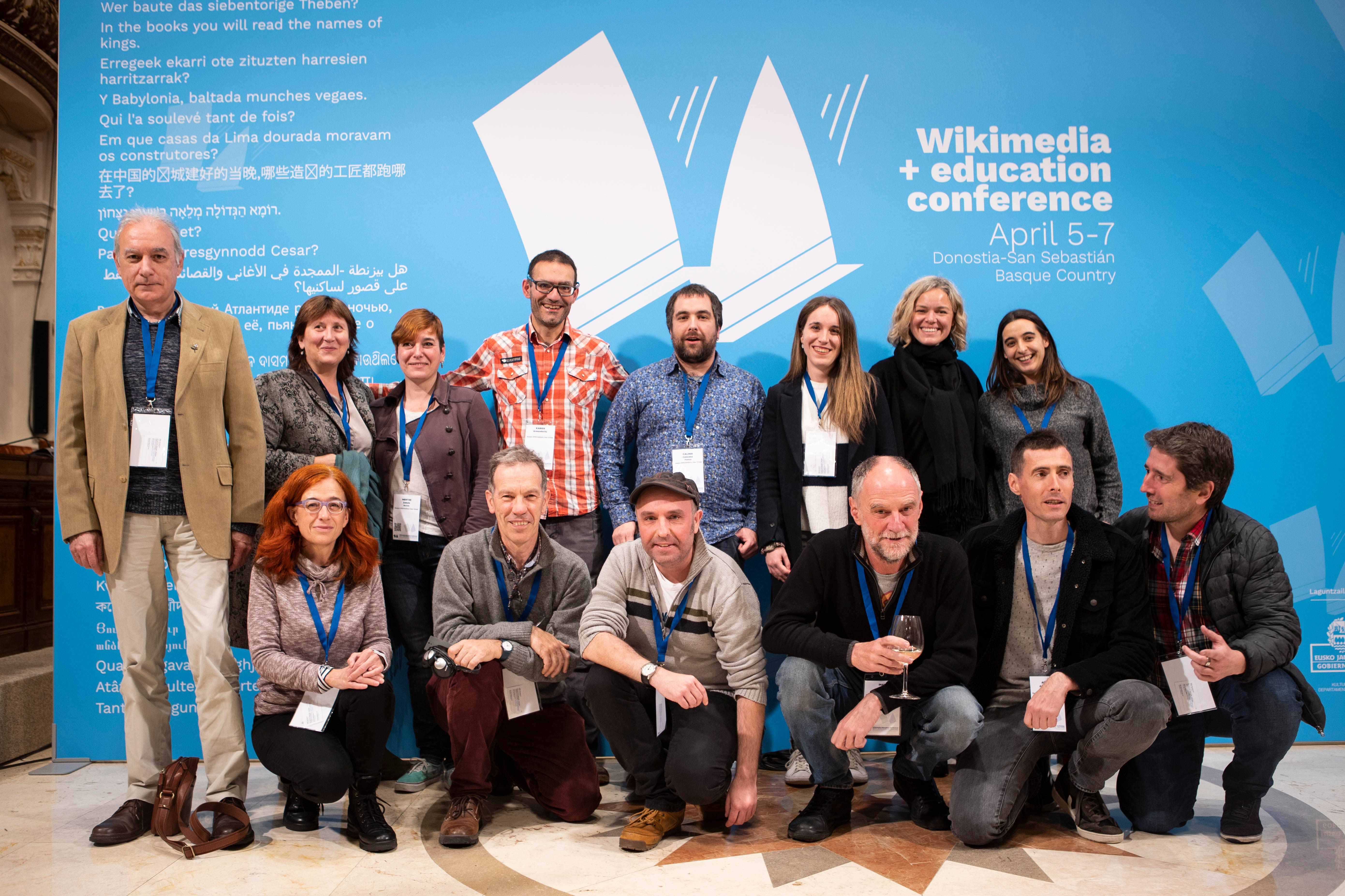 Wikimedia+Hezkuntza nazioarteko konferentziako irekiera ekitaldian euskal wikilarien talde argazkia Katherine Maherrekin, Wikimedia Fundazioko zuzendari exekutiboa.